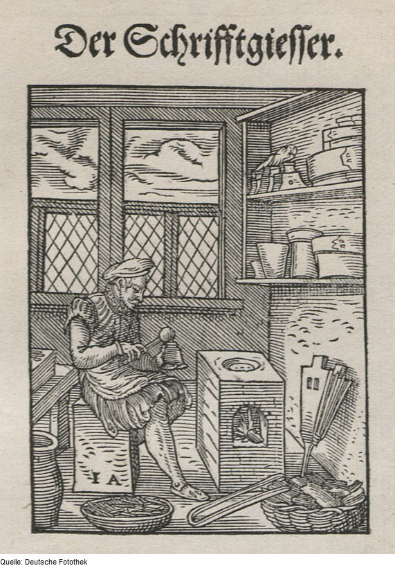 Original image description from the Deutsche FotothekStändebuch & Handwerk & Schriftgießer